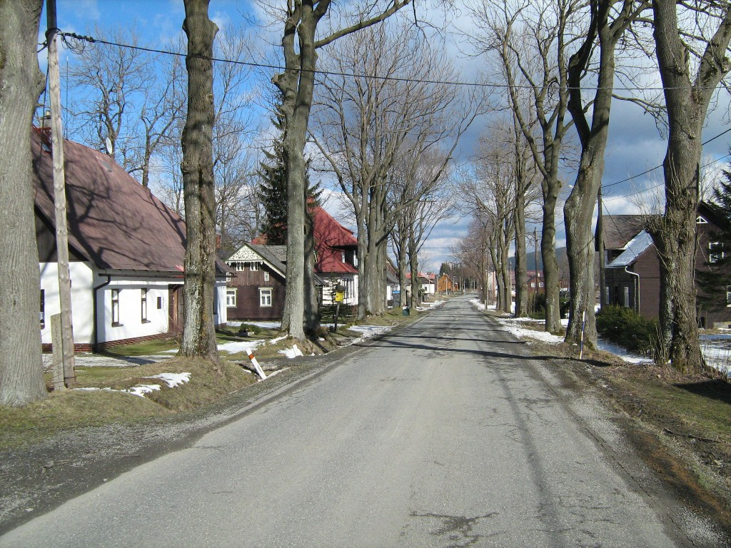 Rejvíz village, CZ